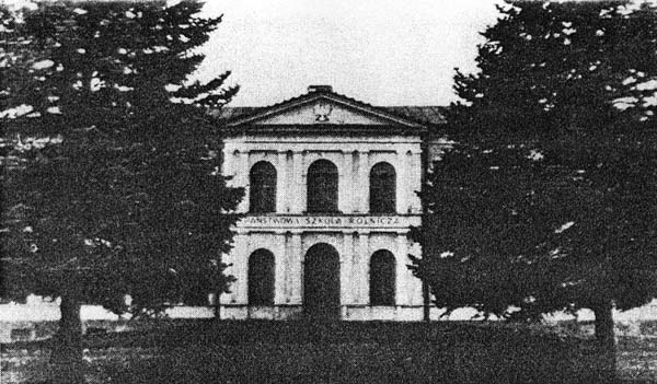 Беларуская (тарашкевіца): Лучай (Łučaj), палац Агінскіх (Aginski)